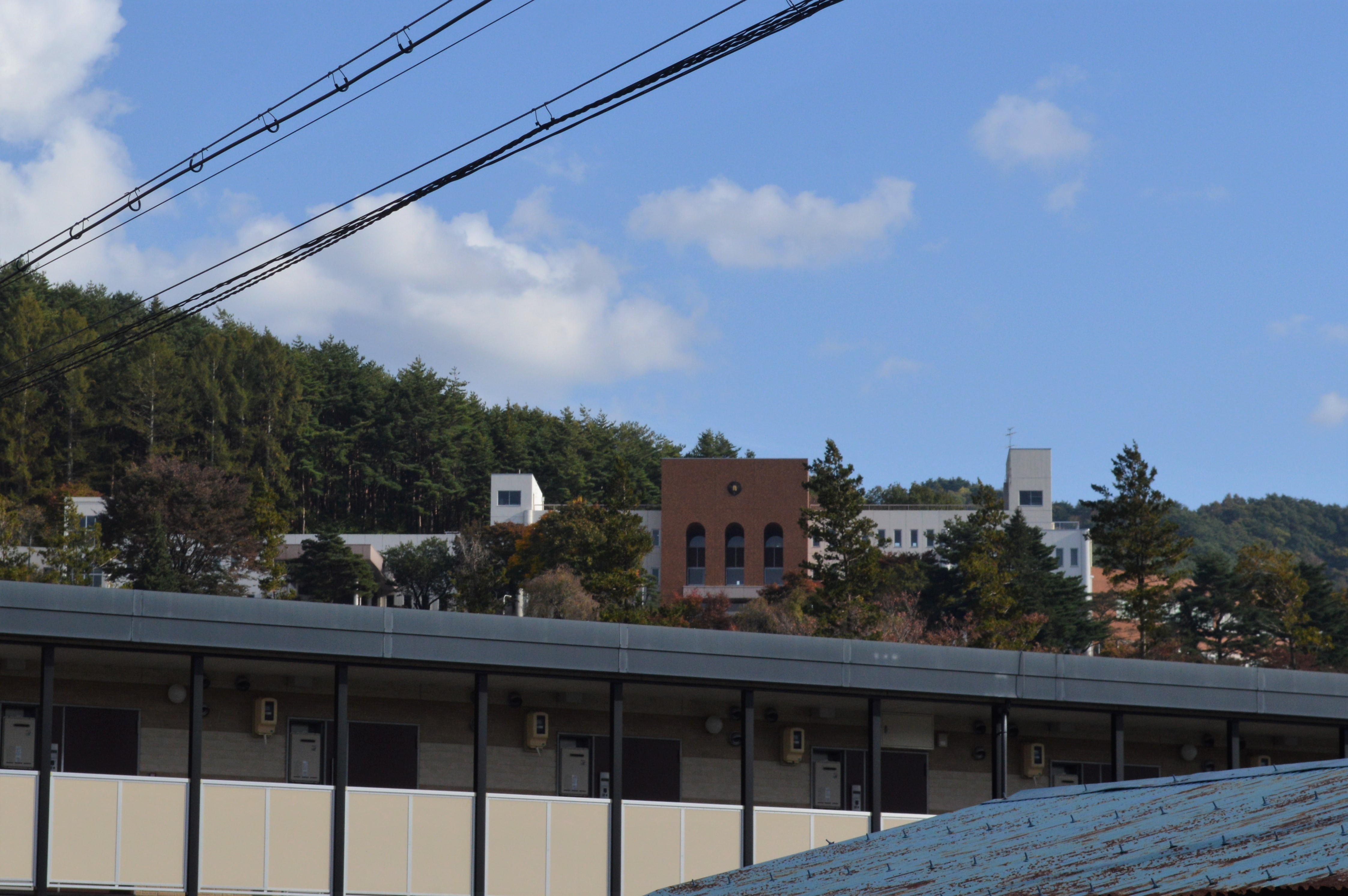 長野県上伊那郡辰野町にある信州豊南短期大学。